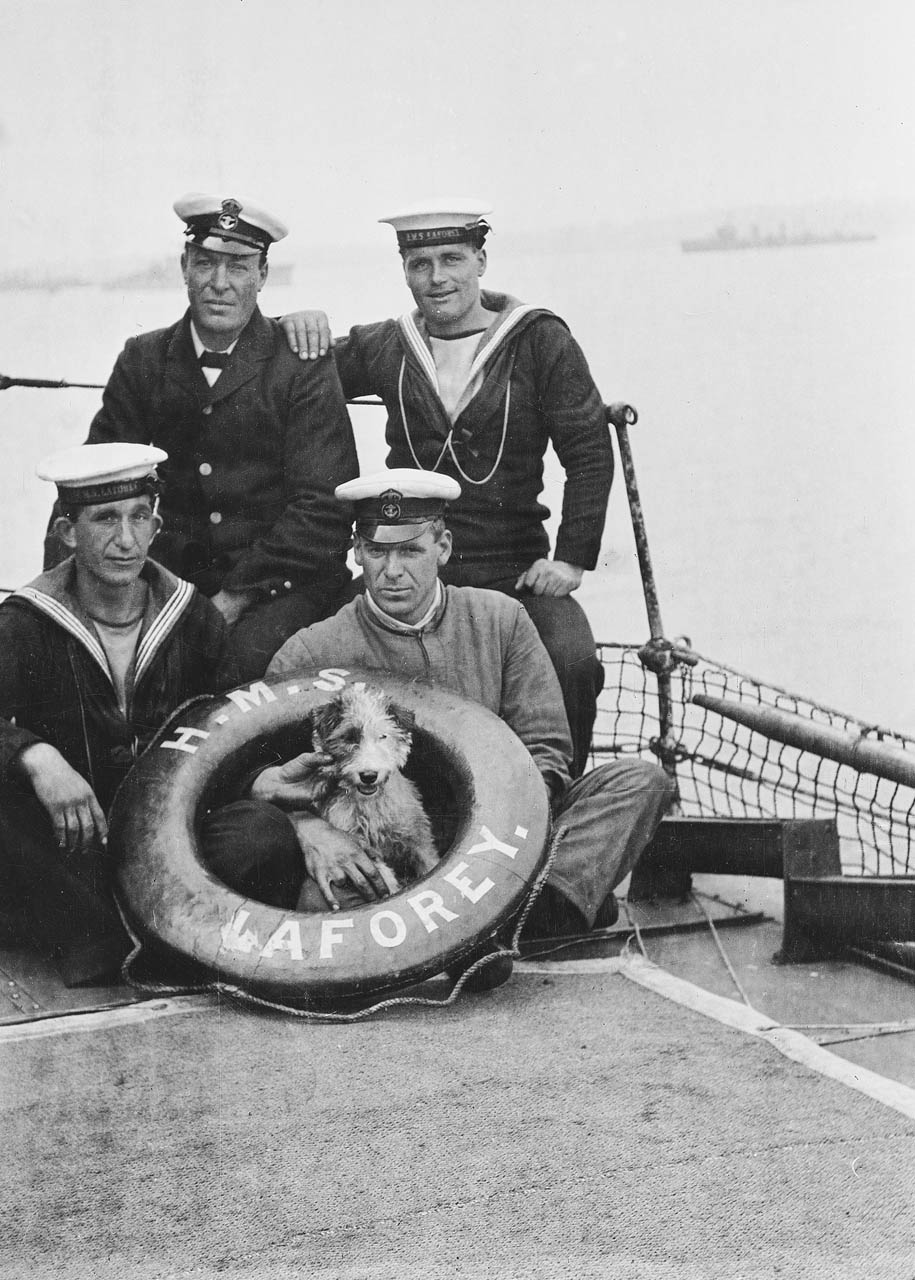 Crewmen with dog on board HMS 'Laforey'.